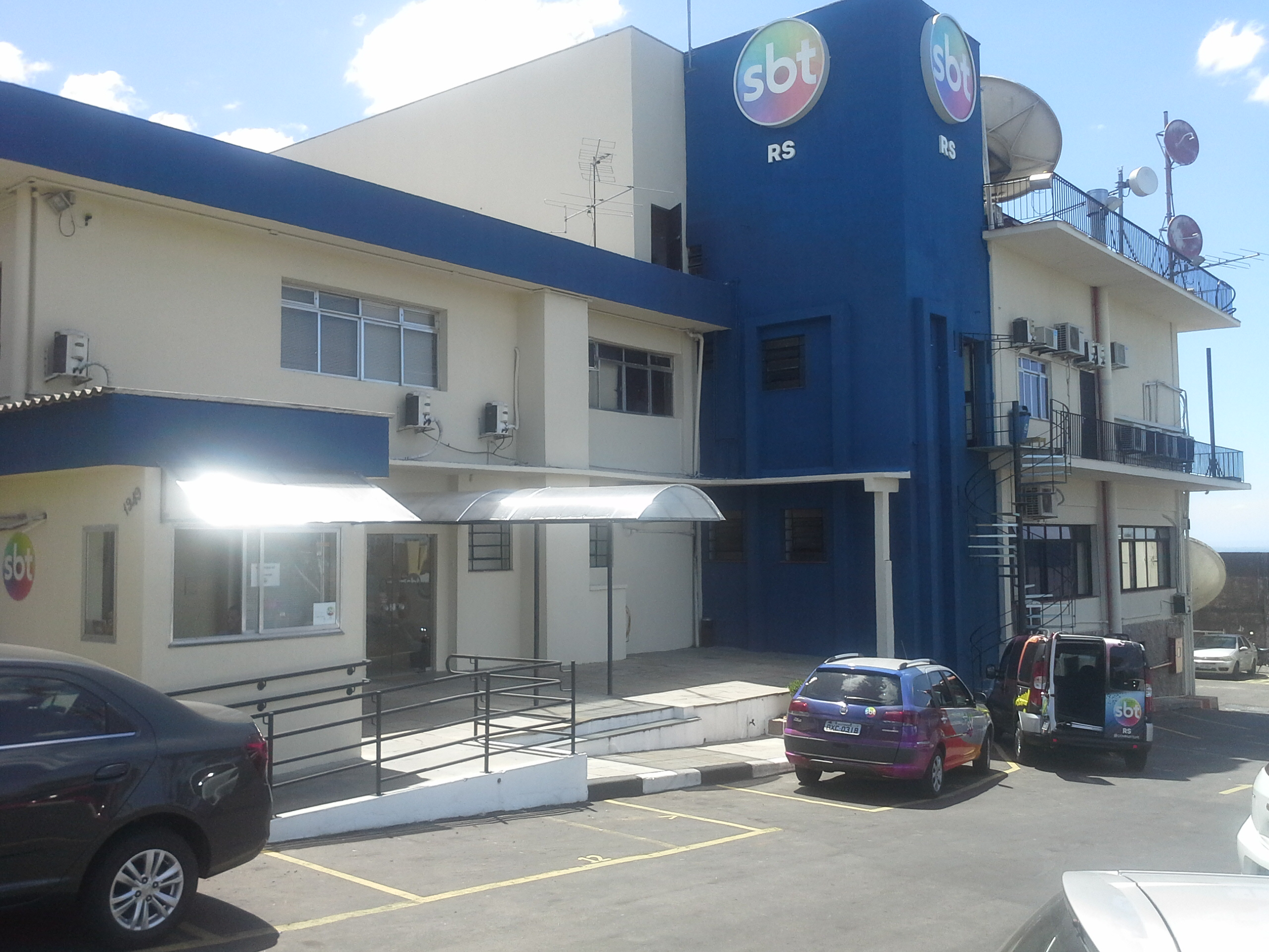 Fachada SBT RS